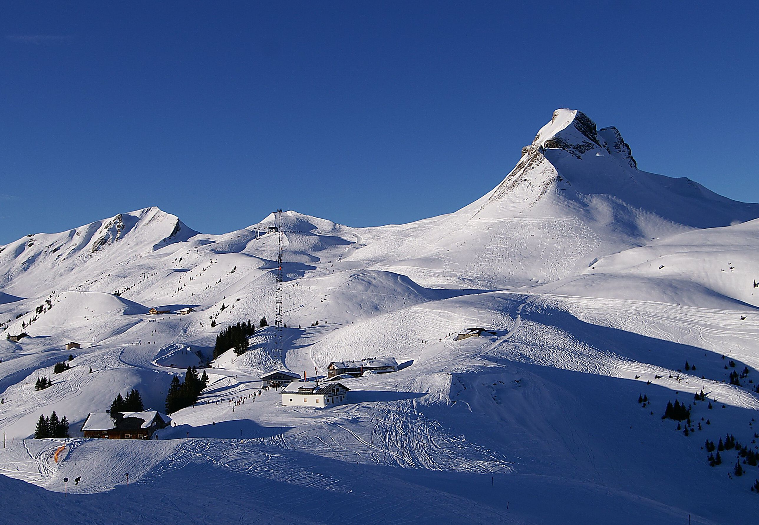 „rechts“ Damülser Mittagsspitze 2095m „mitte“ Bergbahn auf das Hohe Licht 2009m „links“ der Hochblanken 2068m Blick von der Eisenalpstube neben der Bergstation “Uga Express” .